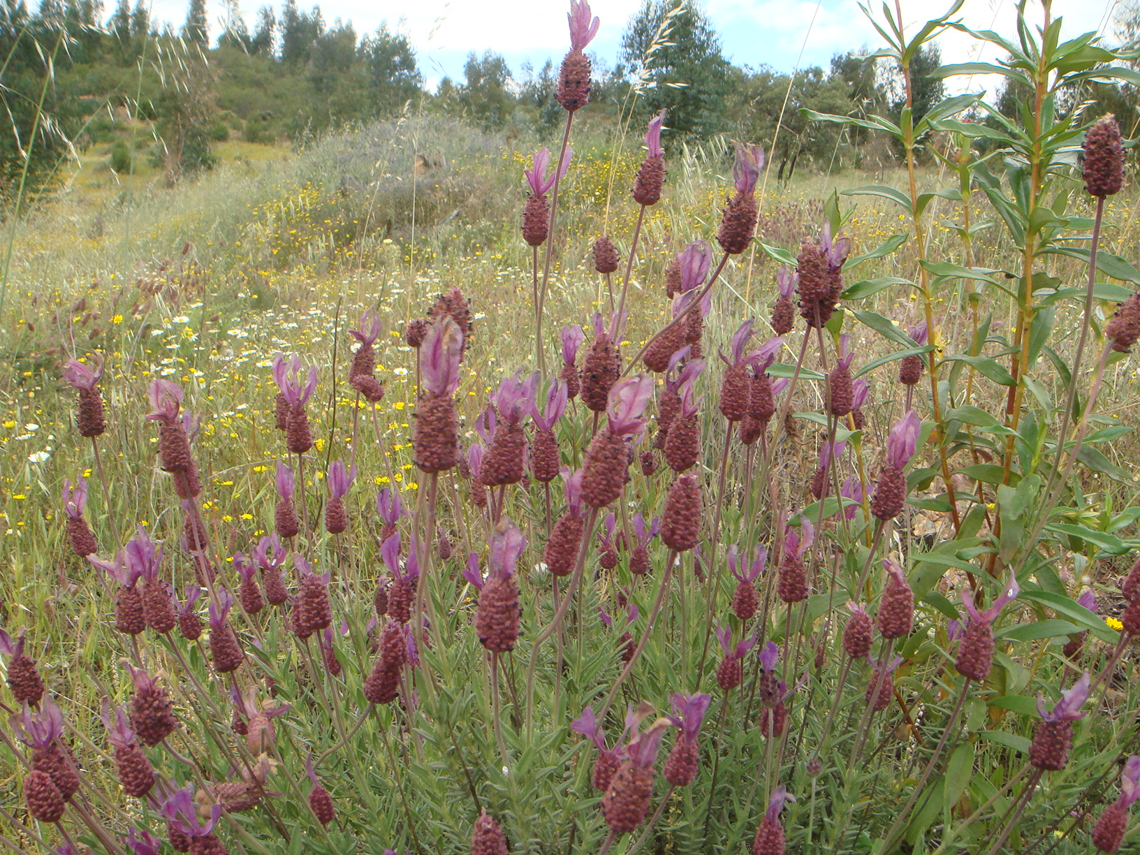 Lavandula pedunculata norte de Sevilla, España